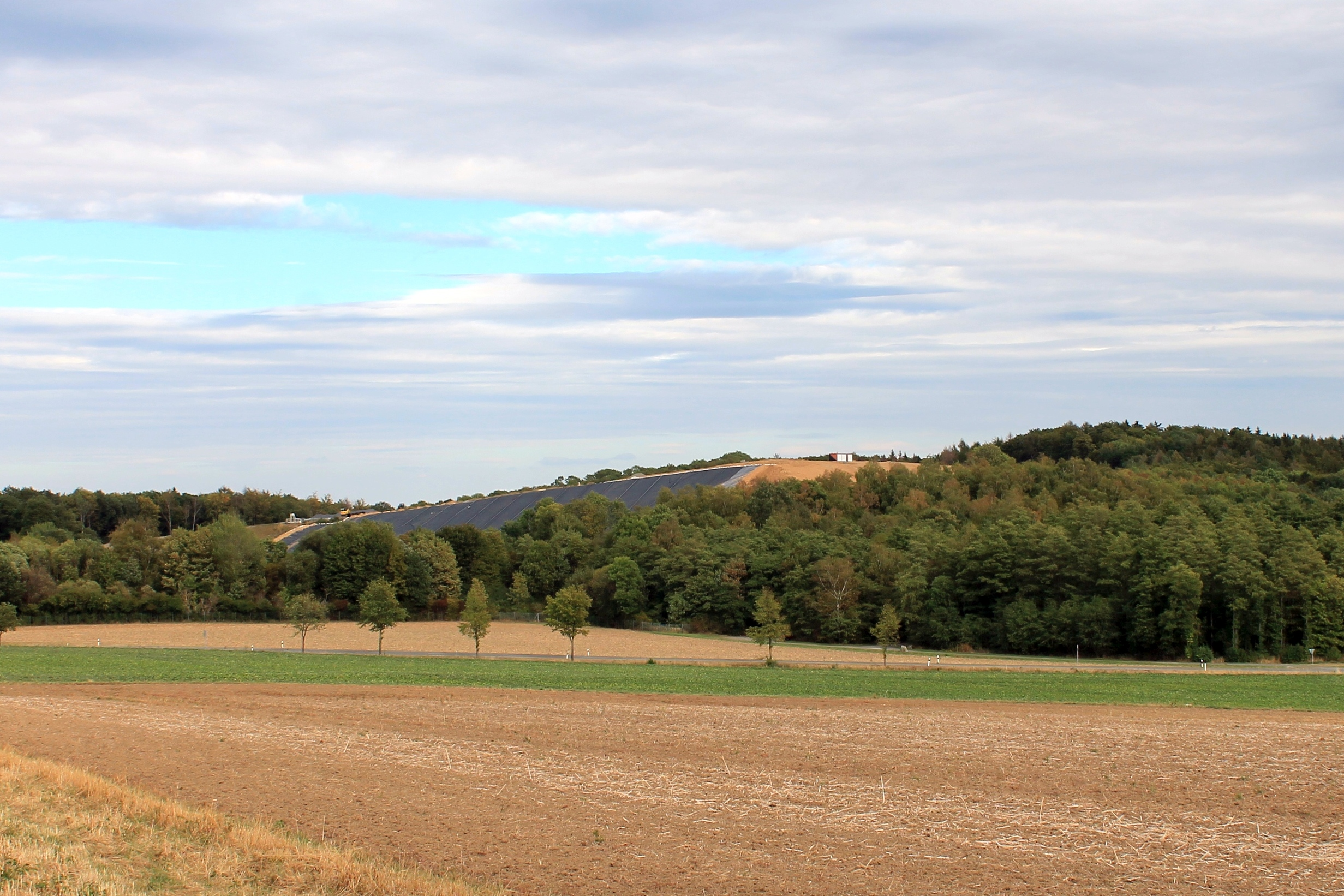 Deponie Morgenstern auf dem Gelände des ehemaligen Tagebaus der Eisenerzgrube Morgenstern bei Döhren, Gemeinde Liebenburg, Niedesachsen, Deutschland.